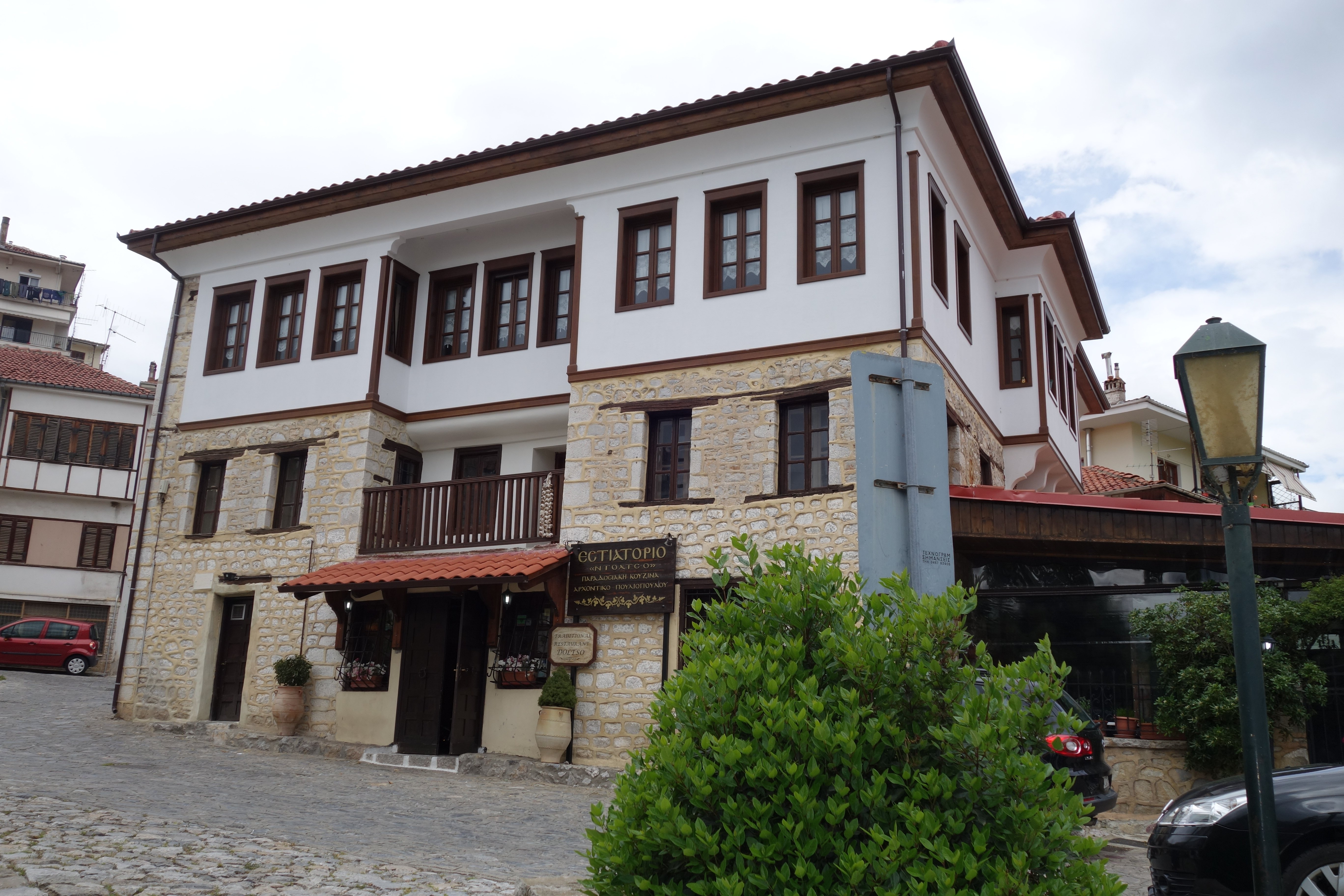 Kürschner in der Stadt Kastoria, Griechenland. Ursprünglich Wohn- und Geschäftshaus der Kürschnerfamilie Pouliopoulos. Siehe auch Kürschner in der Präfektur Kastoria und Kürschner in der Stadt Siatista.